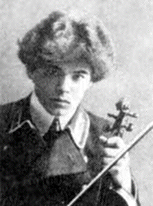 Семенко Михайло Васильович: Семенко Михайло в Петербурзі